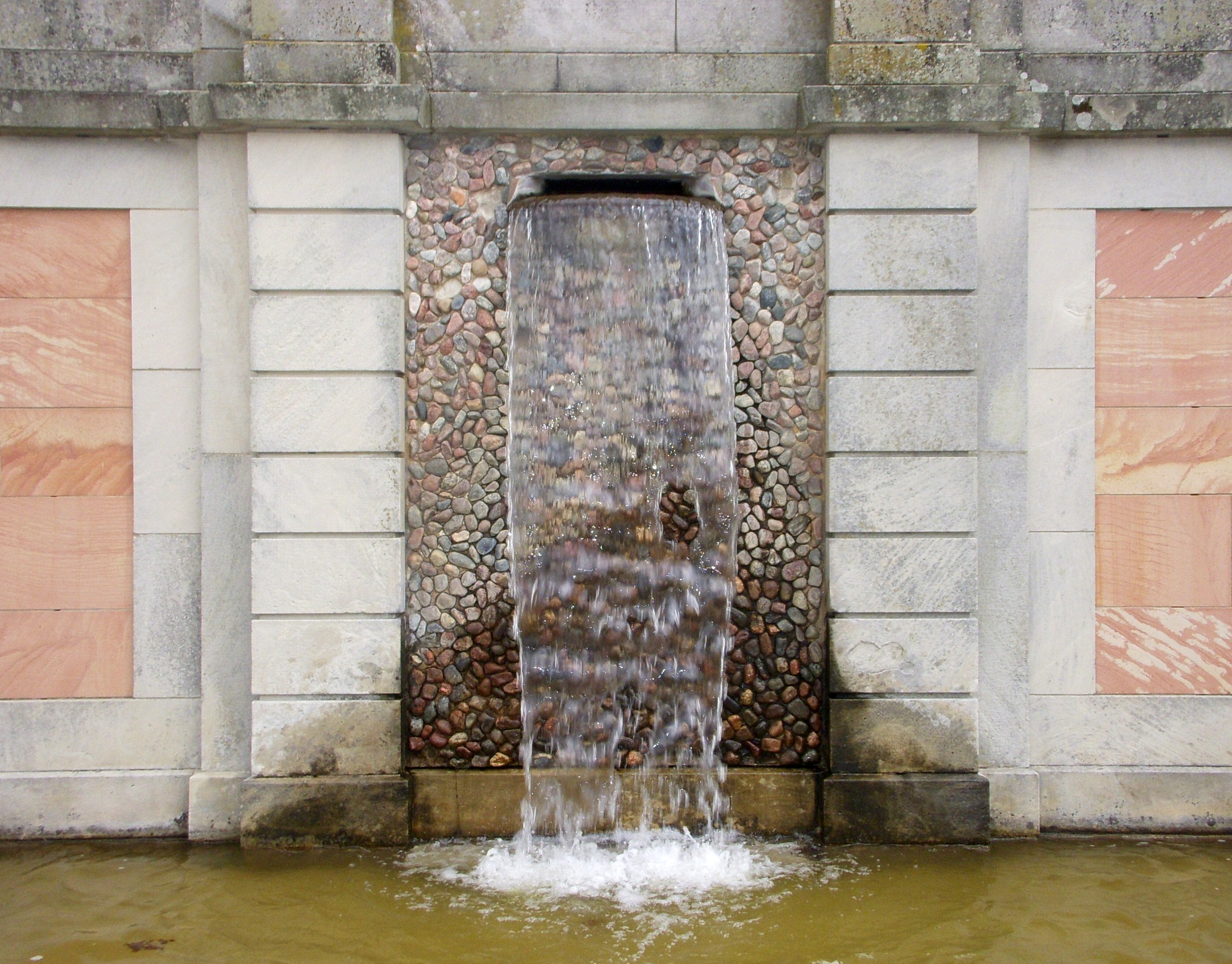 En av Drottningholms 14 kaskader